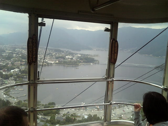 A view from Tenjo-Yama Park Mt. Kachi Kachi Ropeway, Yamanashi.